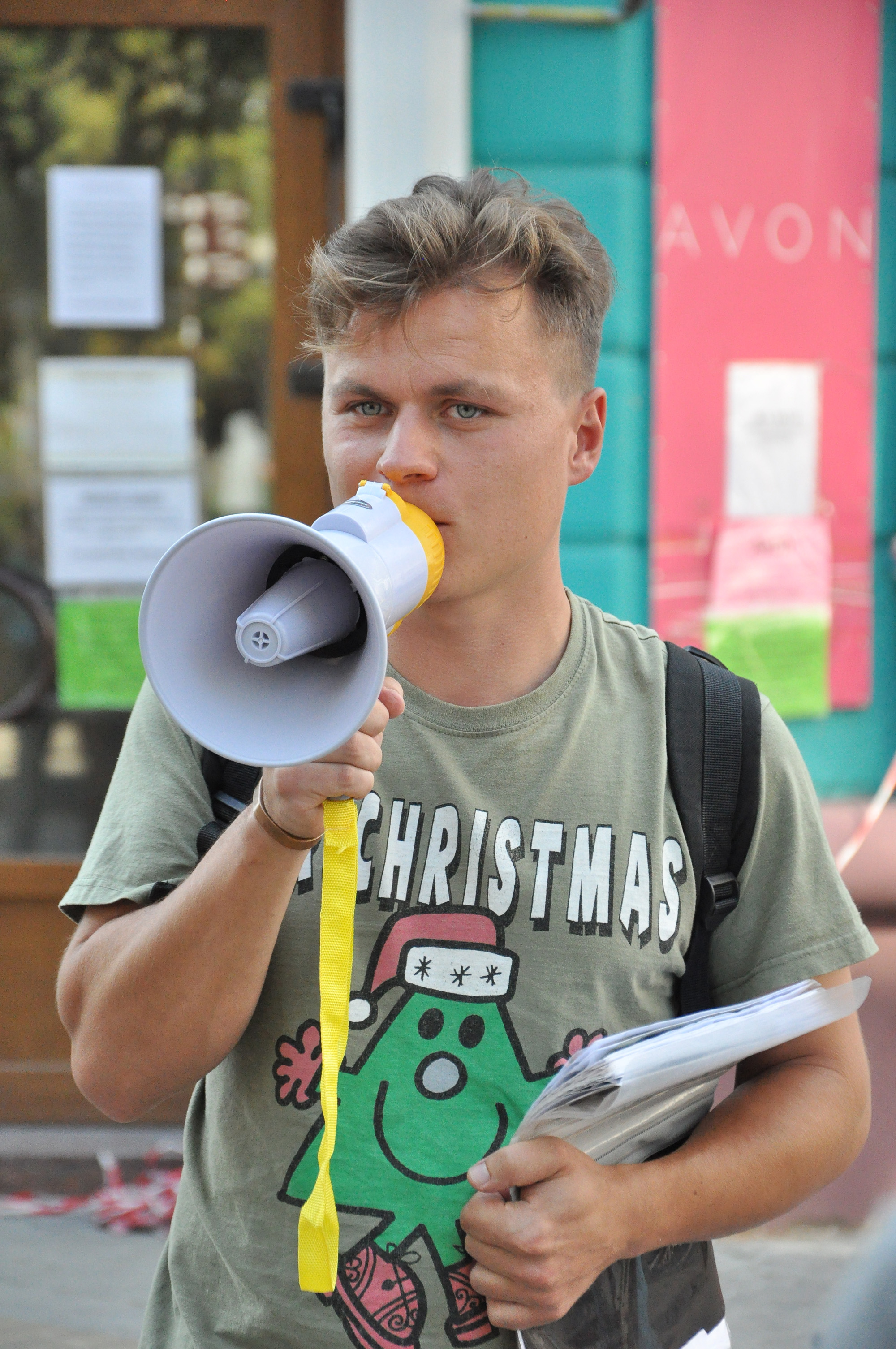 Український краєзнавець, екскурсовод, музикант Тарас Циклиняк.